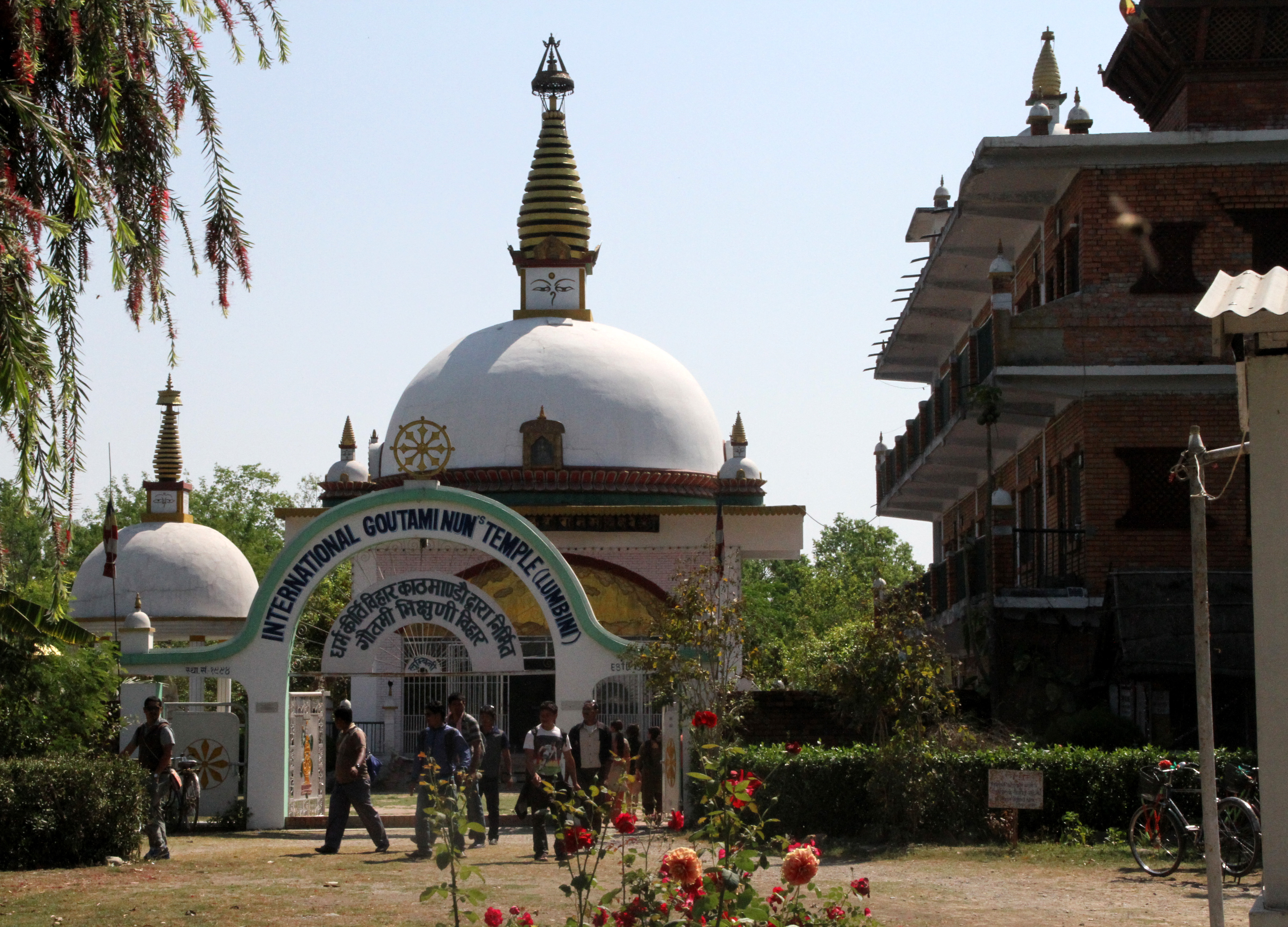 Lumbini